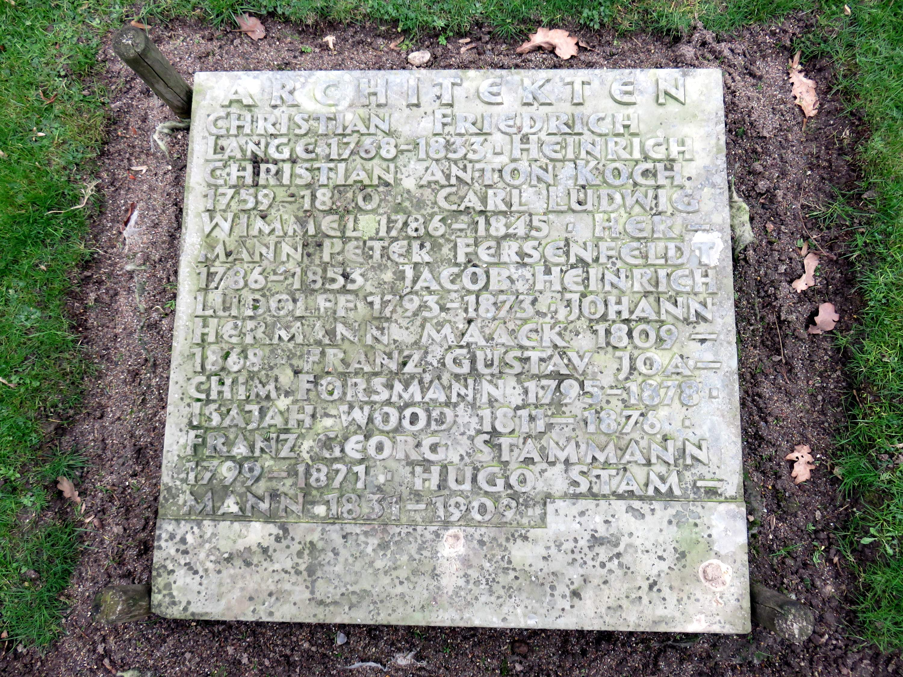 (I.) Sammelgrabmal Architekten im Bereich des Althamburgischen Gedächtnisfriedhofs auf dem Hamburger Friedhof Ohlsdorf (Querachse nordwestliche Seite) zu Ehren von u. a. Carl Ludwig Wimmel, Hermann Peter Fersenfeldt, Johann Hermann Maack, Franz Gustav Joachim Forsmann, Franz Georg Stammann, Hugo Stammann.